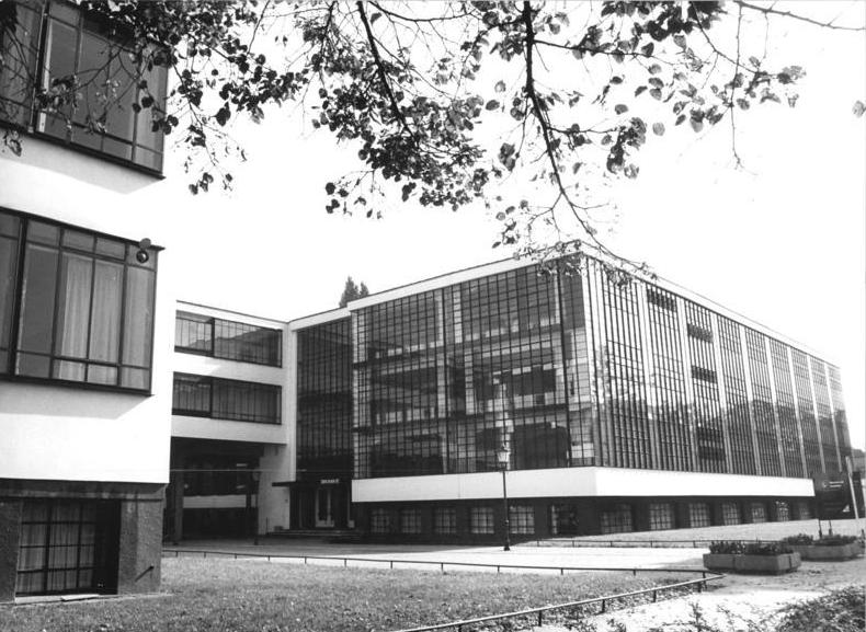 Dessau, Bauhaus ADN-ZB Lehmann 4.2.1987-Di Bez. Halle: Bauhaus- Das Bauhaus Dessau ist eine Bildungs-, Forschungs- und Experimentierstätte für Architekten, Städteplaner und Formgestalter. Das Bauhaus-Gebäude, von Walter Gropius entworfen und am 4.12.1926 eingeweiht, garantiert durch die gläserne Vorhangfassade eine gute Belichtung der Arbeitsräume. Im II. Weltkrieg schwer beschädigt, wurde das Bauhaus anläßlich seines fünfzigjährigen Bestehens am 6.12.1976 nach gründlicher Rekonstruktion als Architektur-Denkmal wieder der Öffentlichkeit zugänglich gemacht. (siehe auch 1987-0204-306 bis 1987-0204-309)